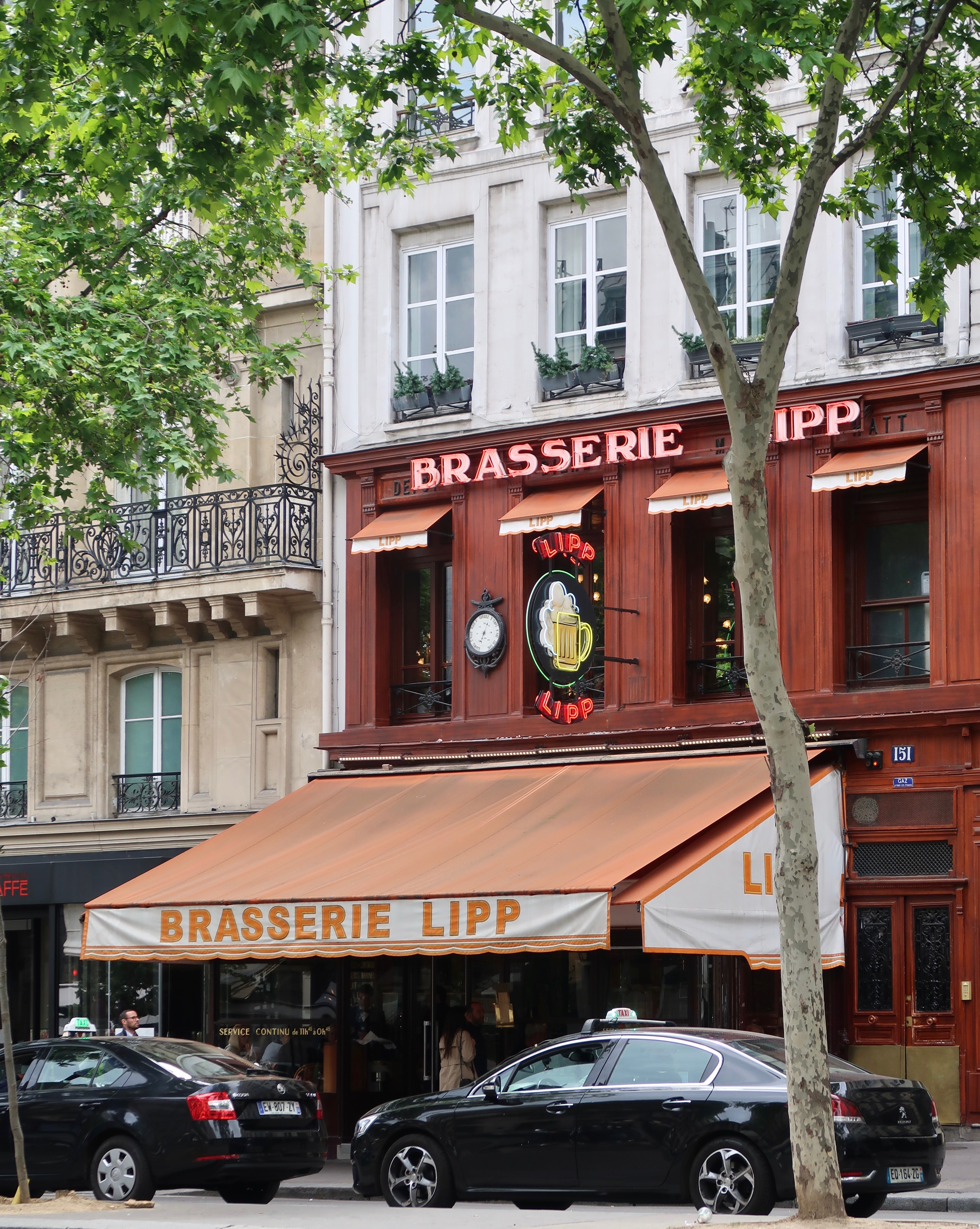 Brasserie Lipp, 151 boulevard Saint-Germain (Paris, 6e).